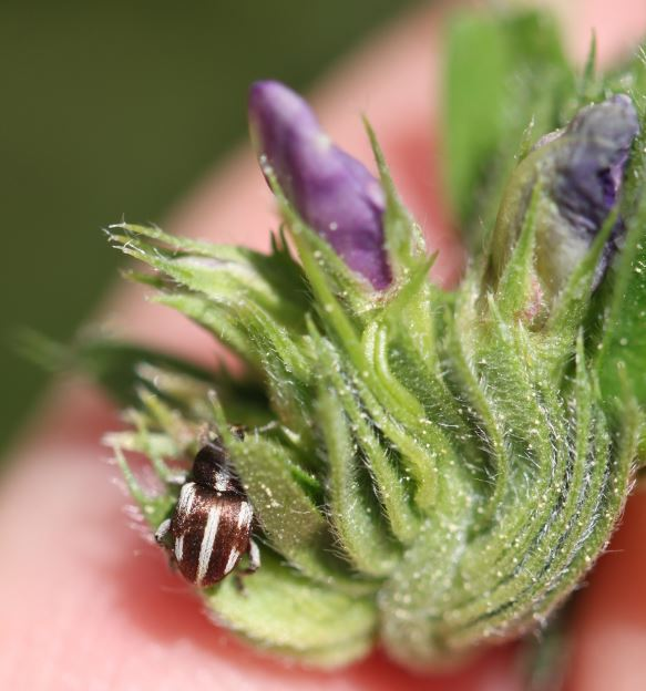 Tychius quinquepunctatus am 27. April 2018 in Walldorf/Baden